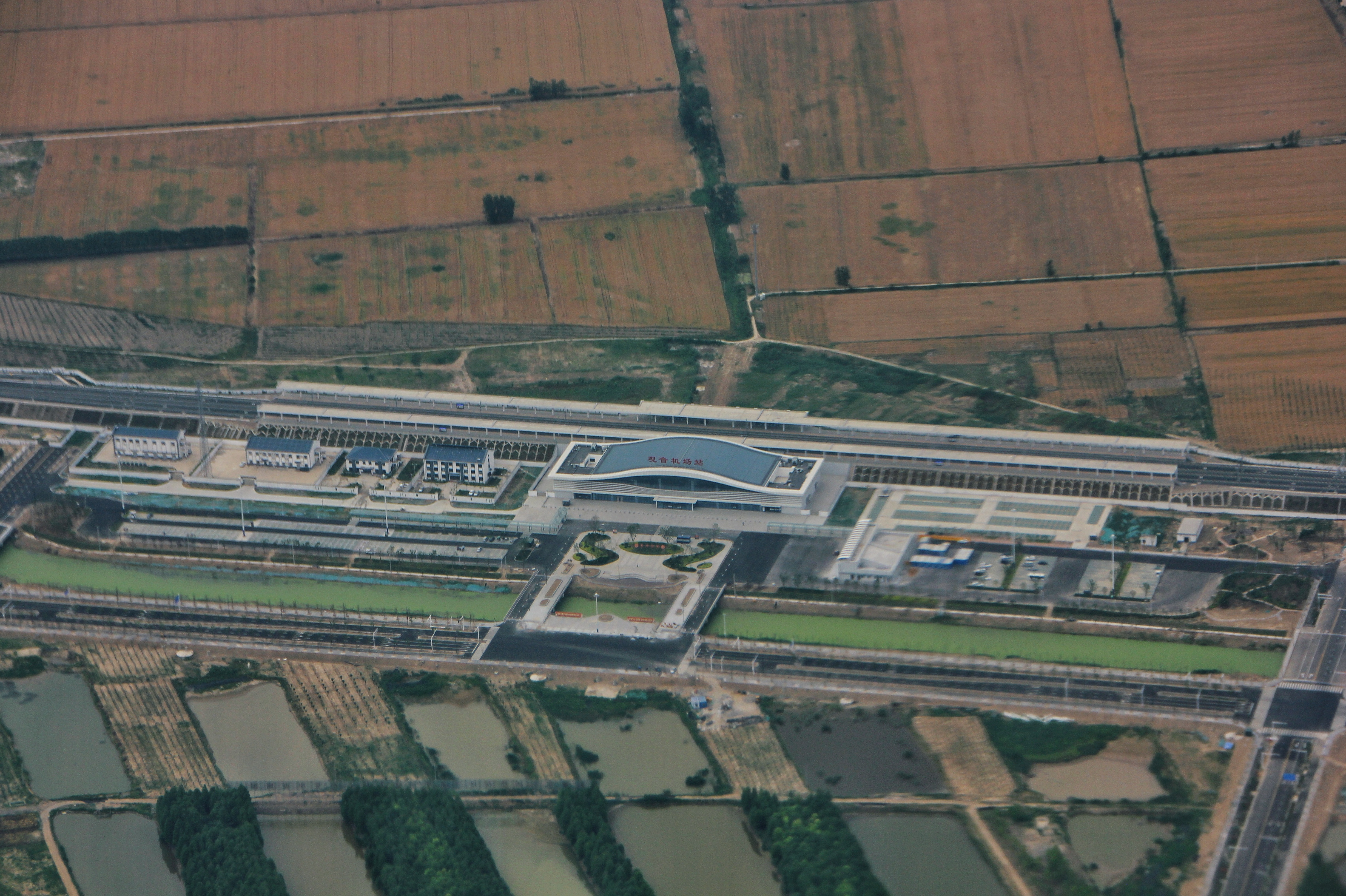 中文（中国大陆）: 自飞往徐州观音机场的飞机上拍摄观音机场高铁站